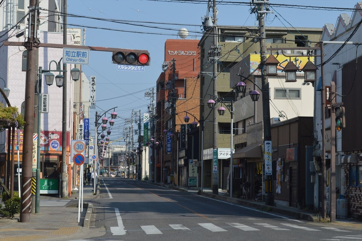 愛知県知立市の名鉄知立駅前にある知立中央通り。